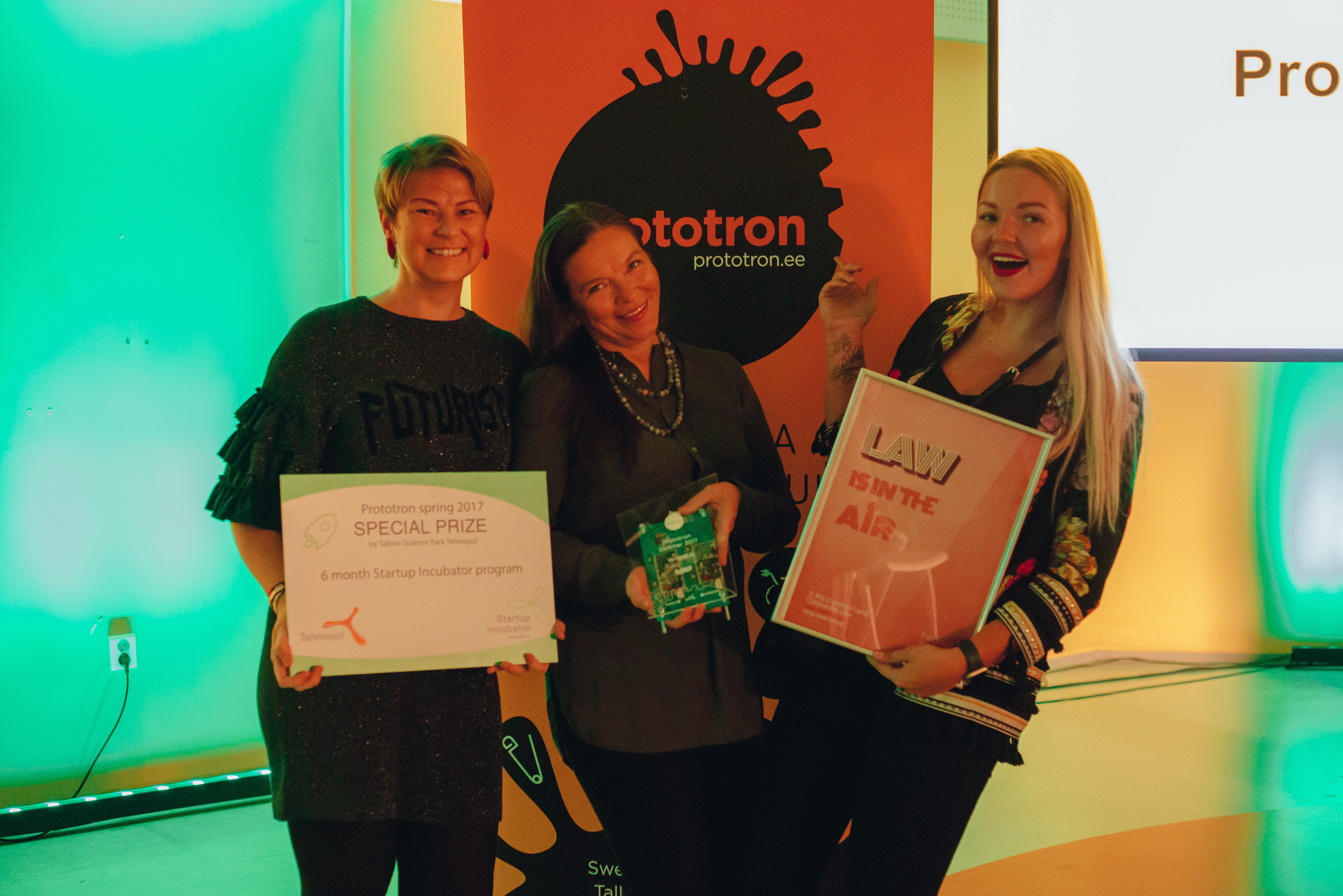 Prototron 18. vooru autasustamisel tehtud foto tiimist hINF